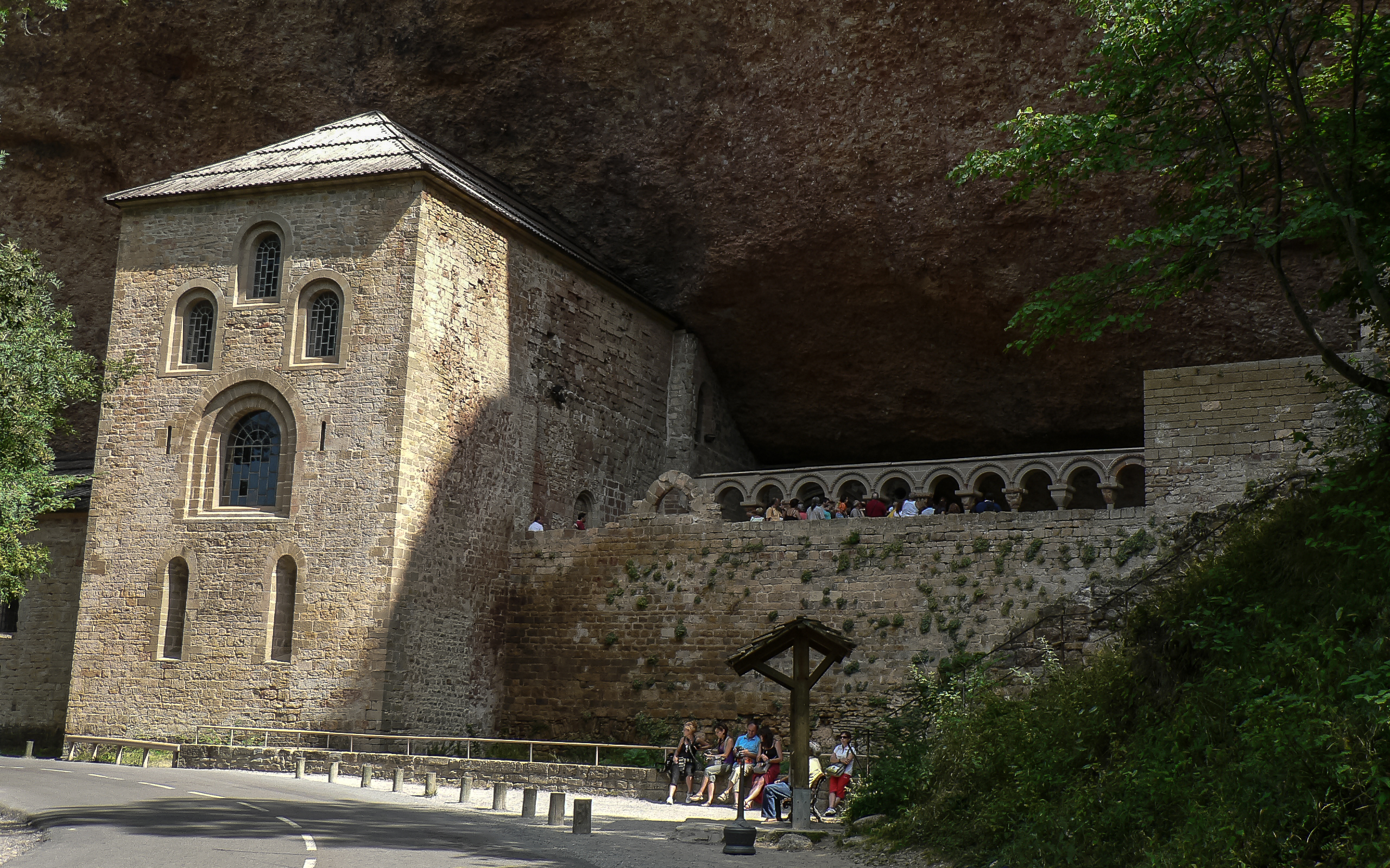 CS 22082009 #160730 #45635.jpg